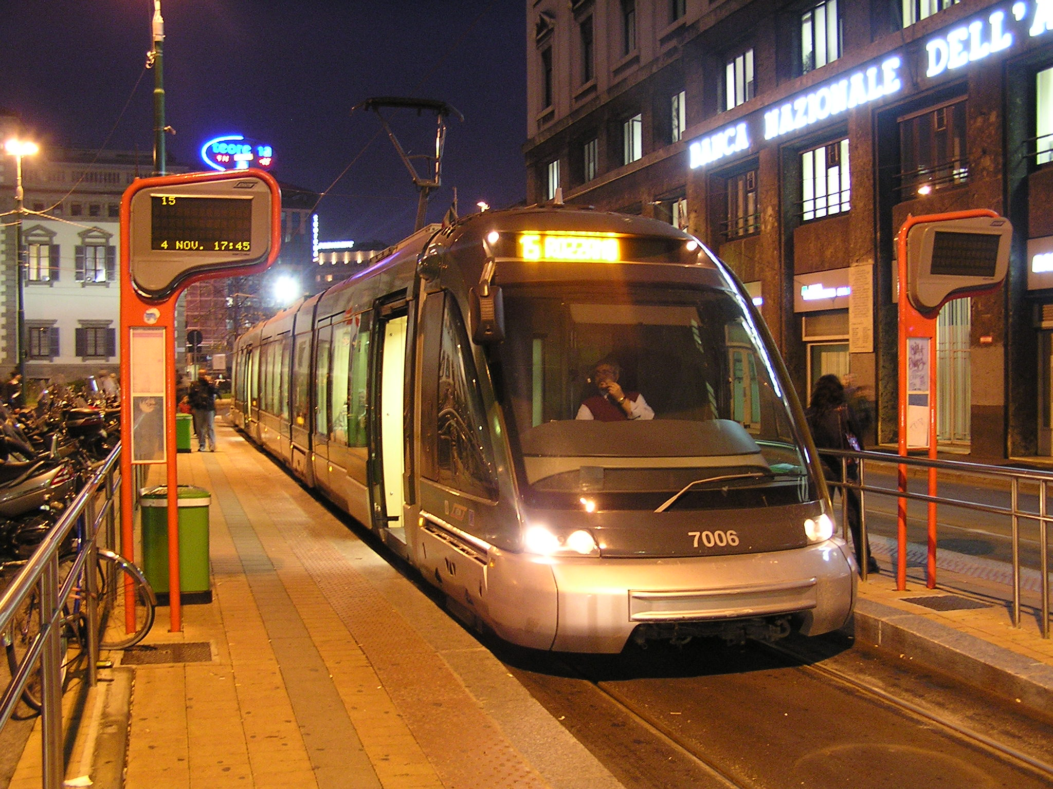 Eurotram à Milan (Piazza Fontana).